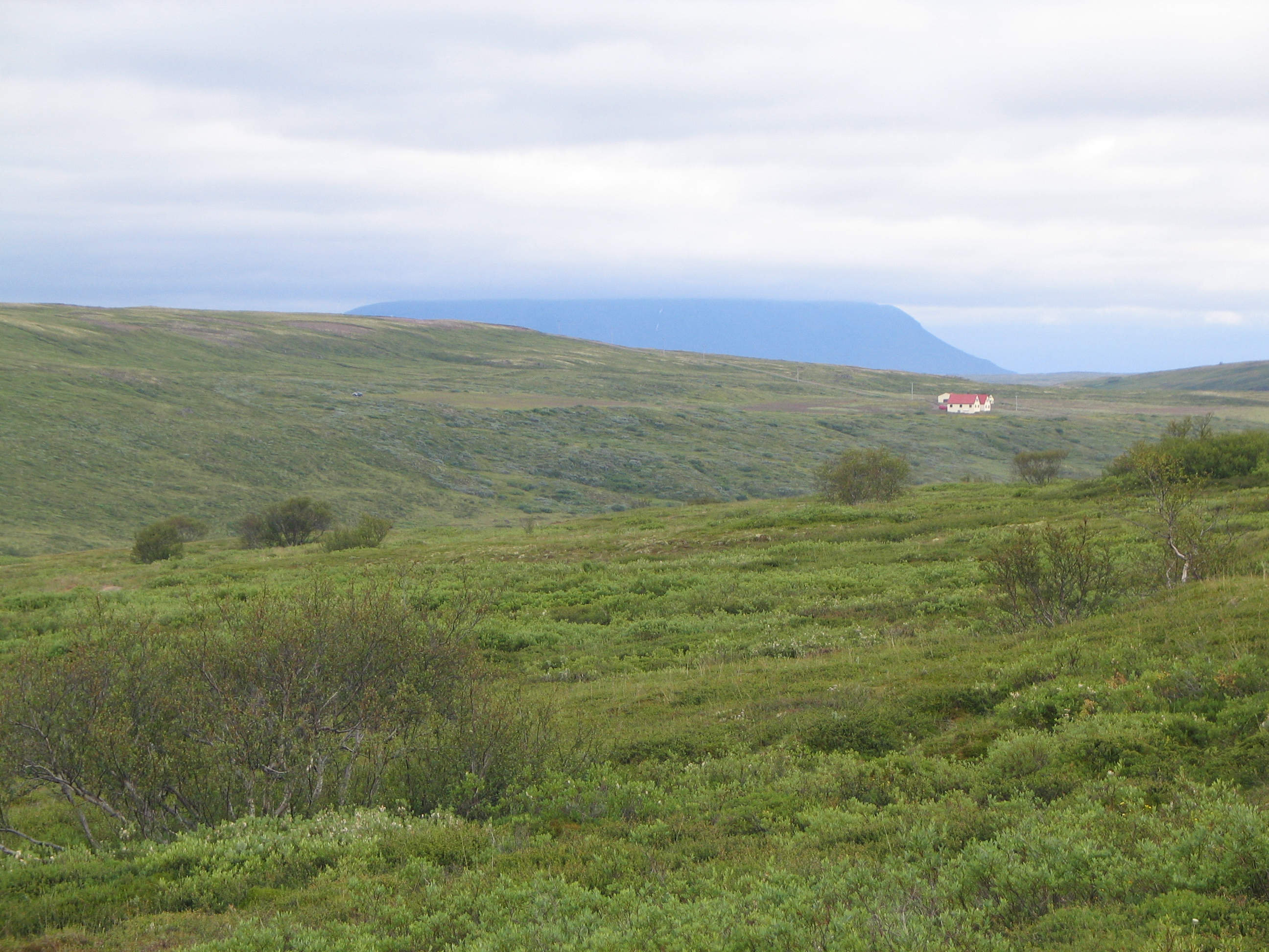 Í Brettingsstaðalandi, Hofstaðir handan Laxár og Bláfjall í fjarska